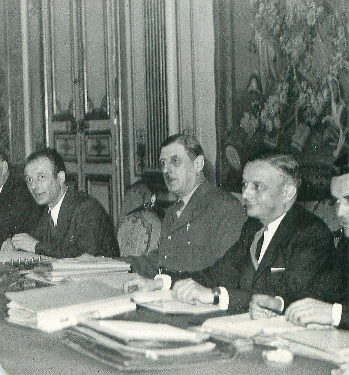 De gauche à droite : le ministre de l'Information Pierre-Henri Teitgen, le général Charles de Gaulle et le ministre des Affaires étrangères Georges Bidault photographiés durant un conseil des ministres du Gouvernement provisoire de la République française, le 2 novembre 1945.